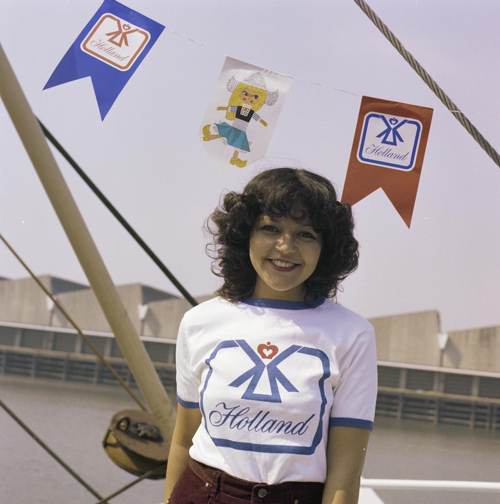 De Marokkaanse zangeres Samira Bensaïd tijdens een fotosessie voor het Eurovisie Songfestival 1980